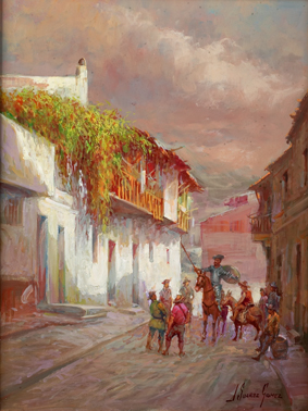 Cuadro al oleo pintado por José Suárez Gómez